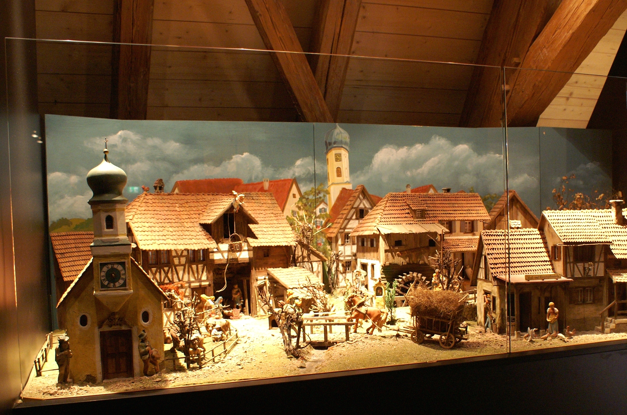 Das Schwäbische Krippendorf im Krippenmuseum Oberstadion